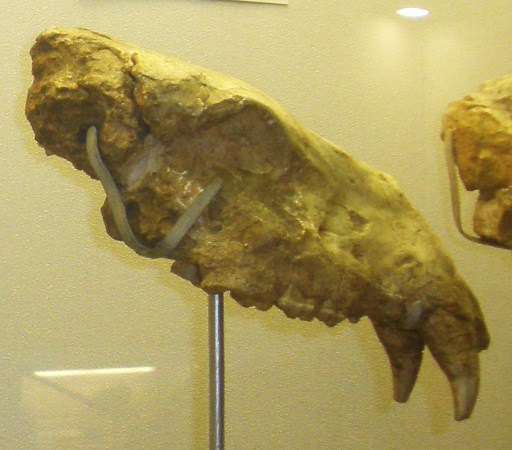 Fossil of Ursus, an extinct mammal -- Topok the picture at Museo di Paleontologia di Firenze